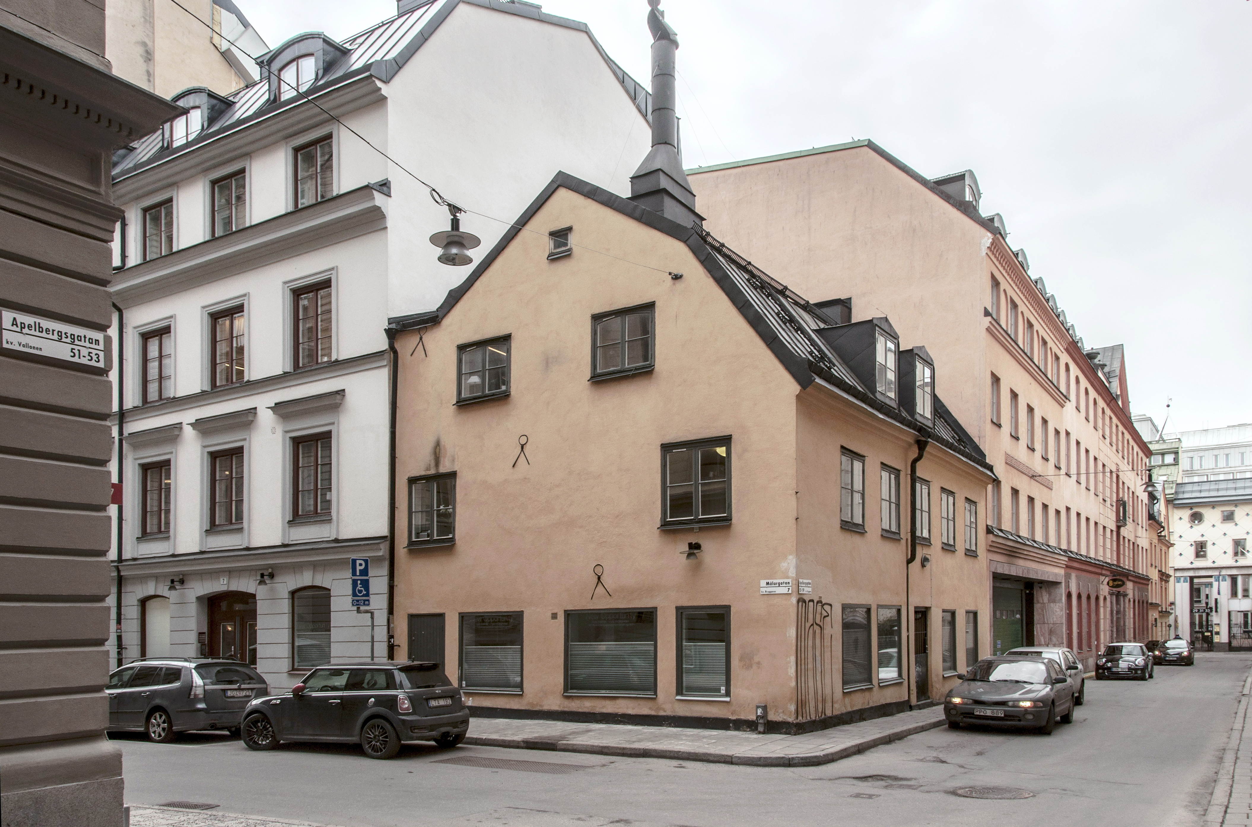 Målargatan / Apelbergsgatan Byggnadsår 1757 (hörnhuset),arkitekt P Roos, byggherre P Broberg.